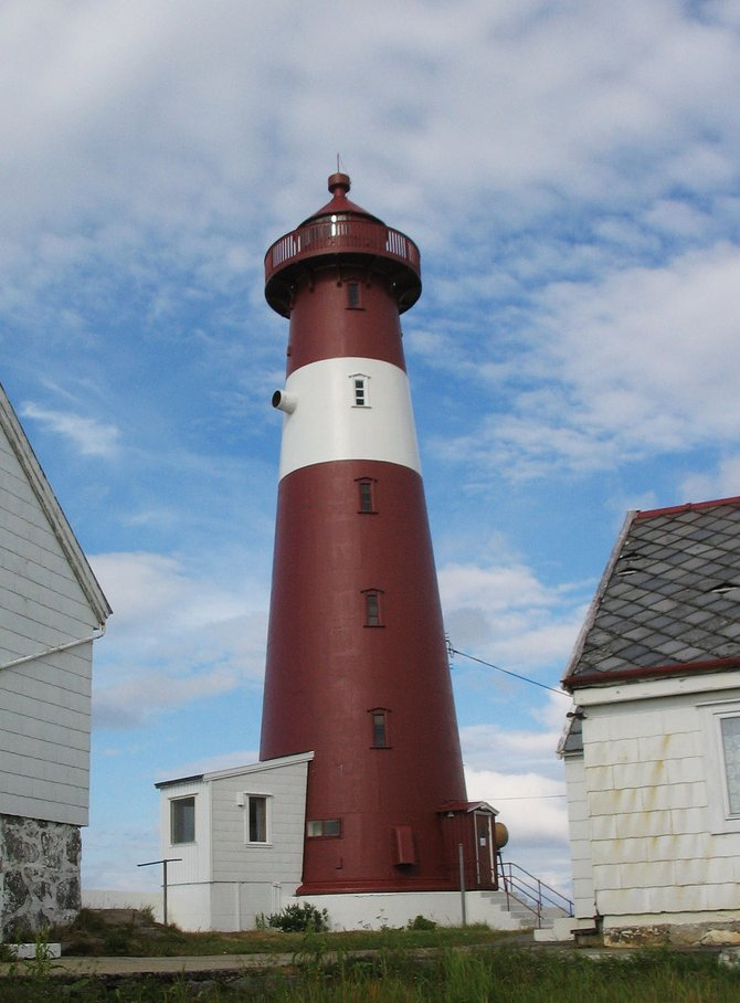 Trznøy fyr at hammarøy norway